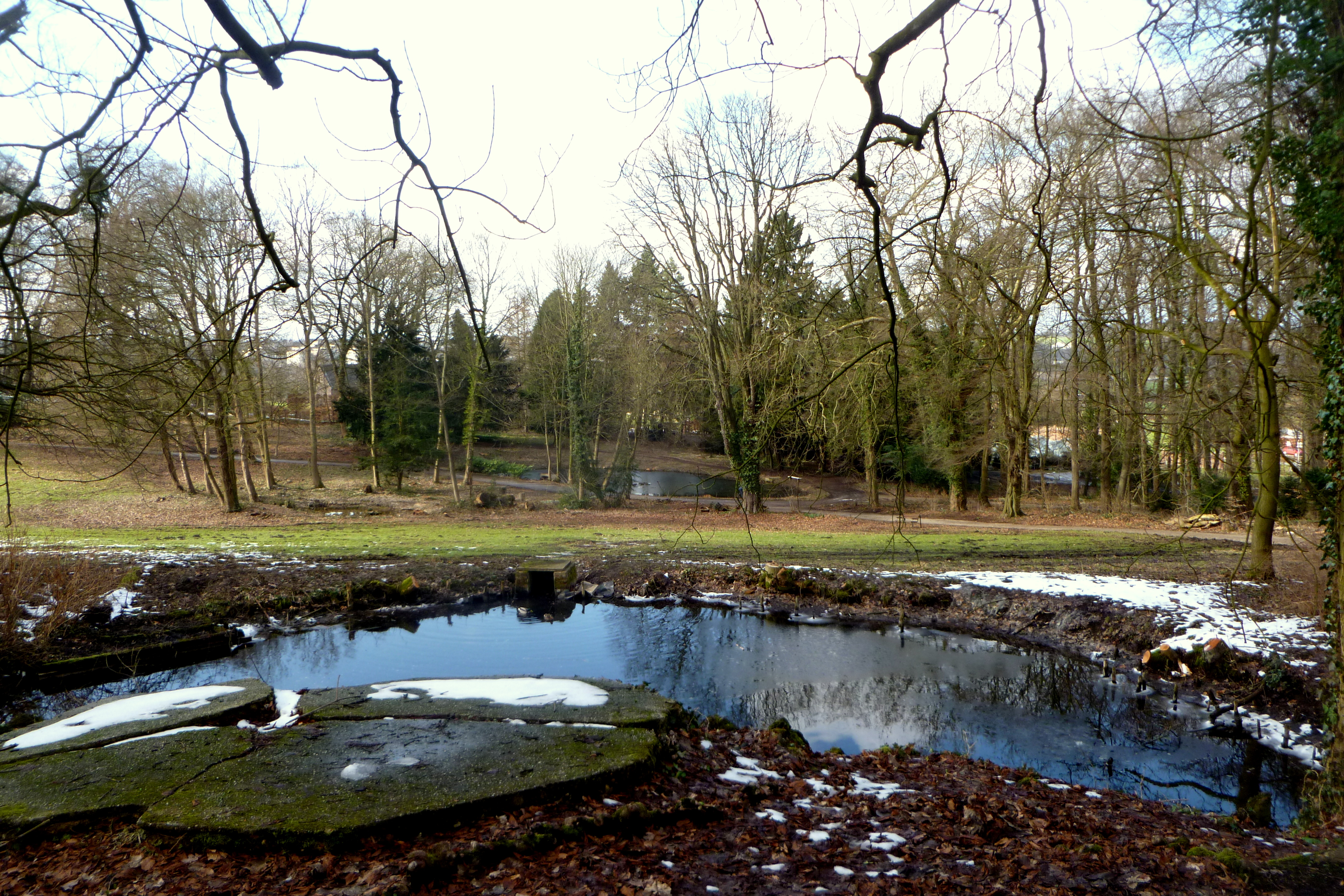 Teiche Müschpark Aachen. Vorne der Waldteich, im Hintergrund der Teich am Gutshaus